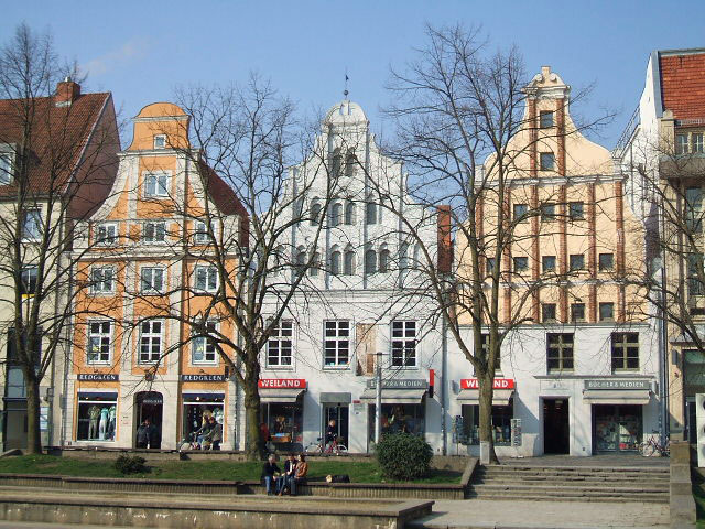 Gebäude bzw. Gebäudedetail in Stralsund. Straße und Hausnummer siehe Dateiname.